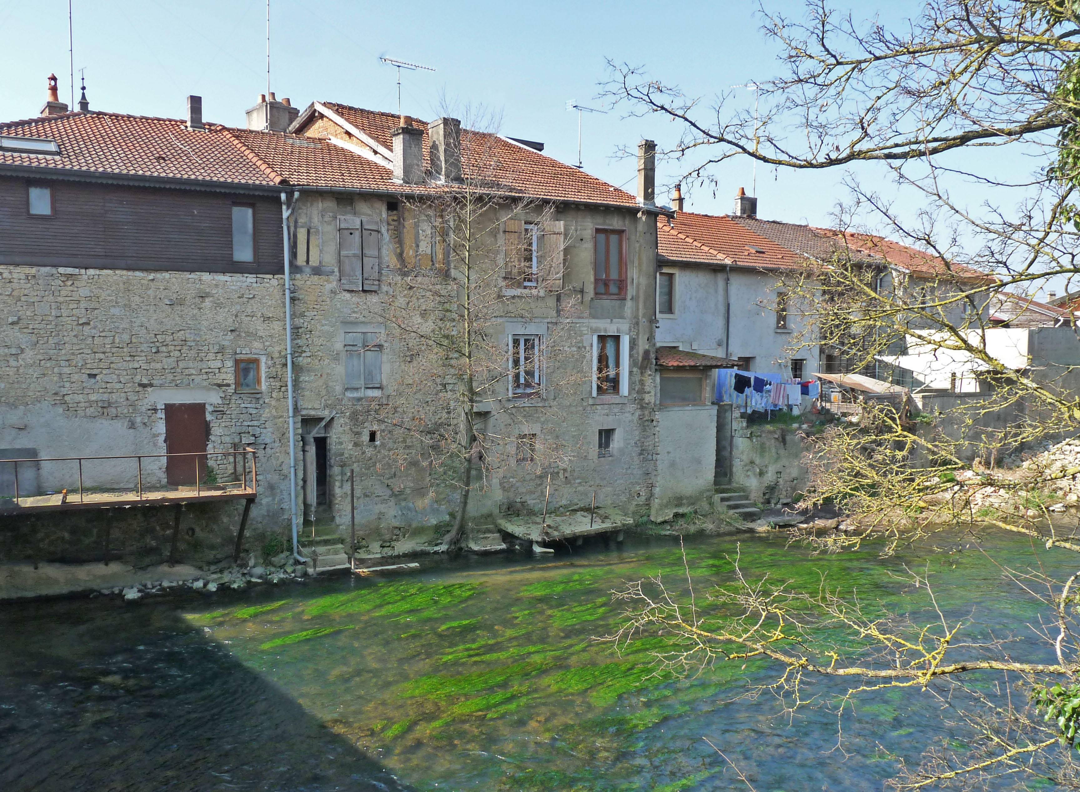 La Blaise (affluent de la Marne) à Wassy (Haute-Marne).